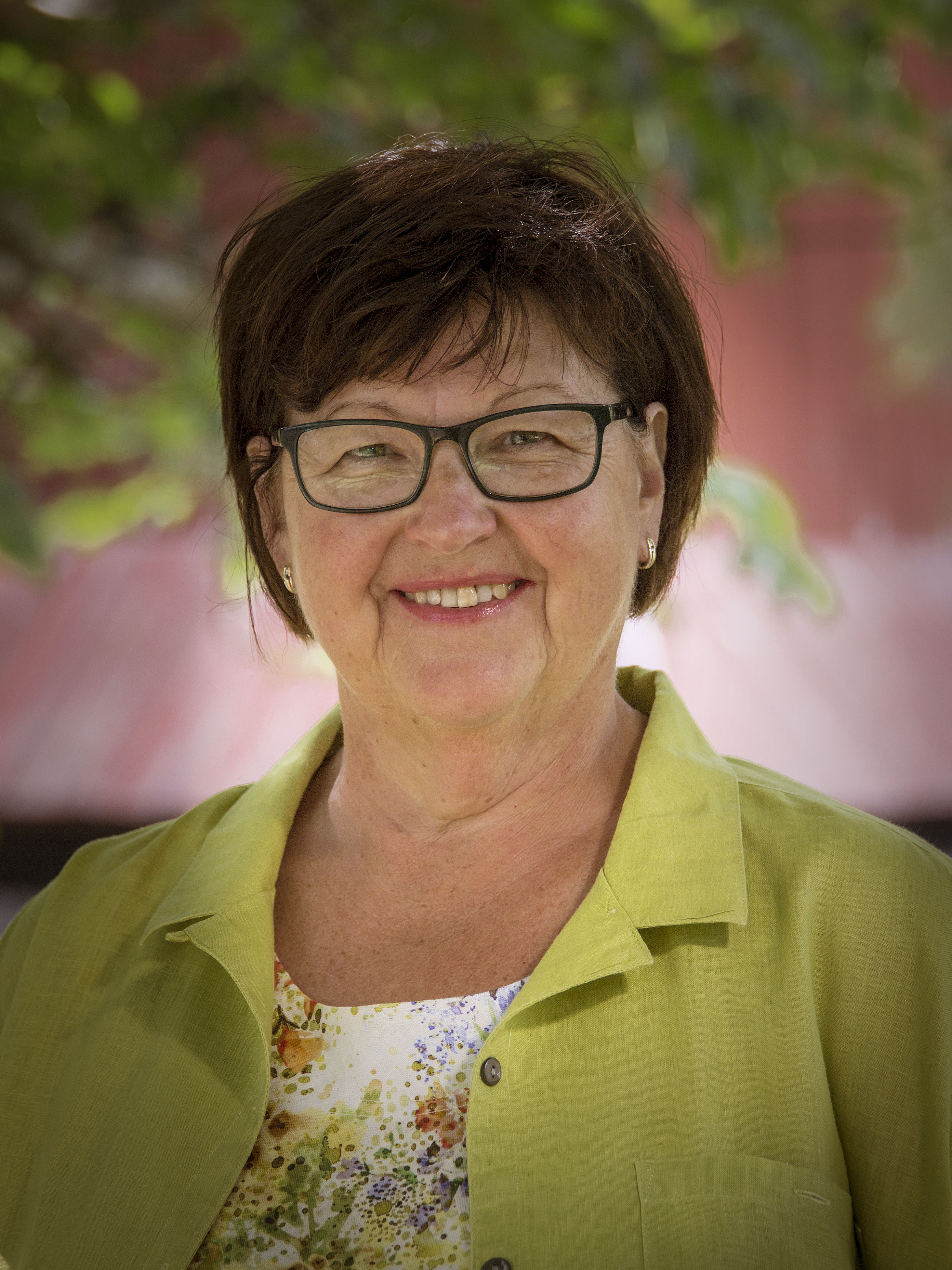 Carola Gunnarsson kandiderar till riksdagen för Centerpartiet.